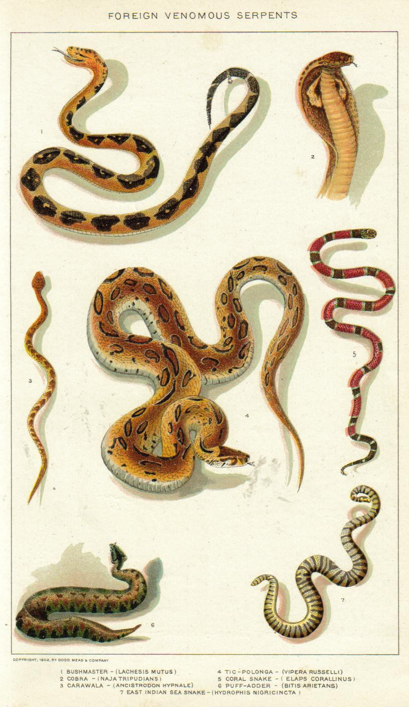 Painting